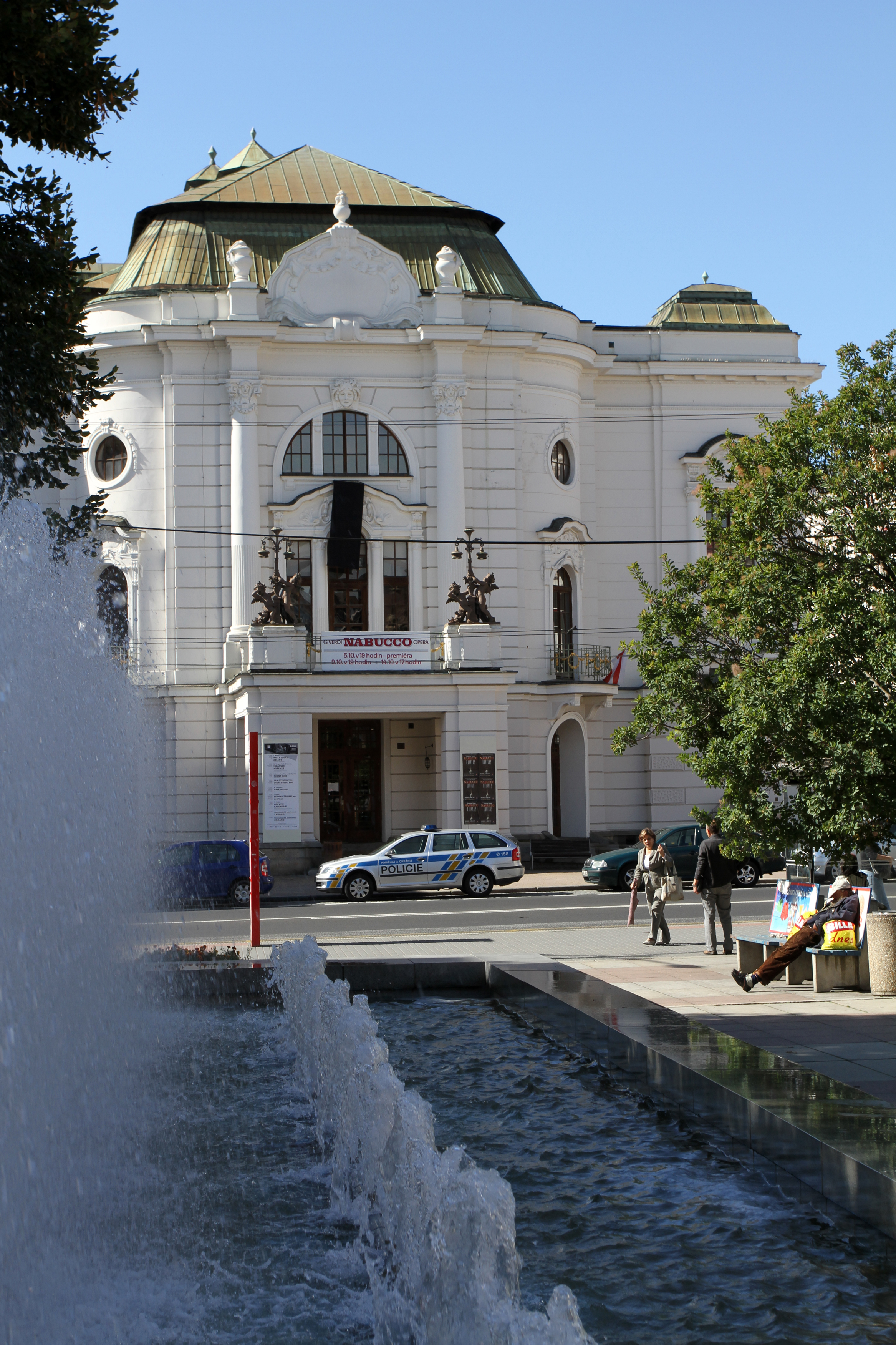 Divadlo - Severočeské divadlo opery a baletu (pův. Zdeňka Nejedlého) (Ústí nad Labem), Lidické nám. 1710/10, Ústí nad Labem